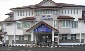 gambar sekolah sk lesong batu